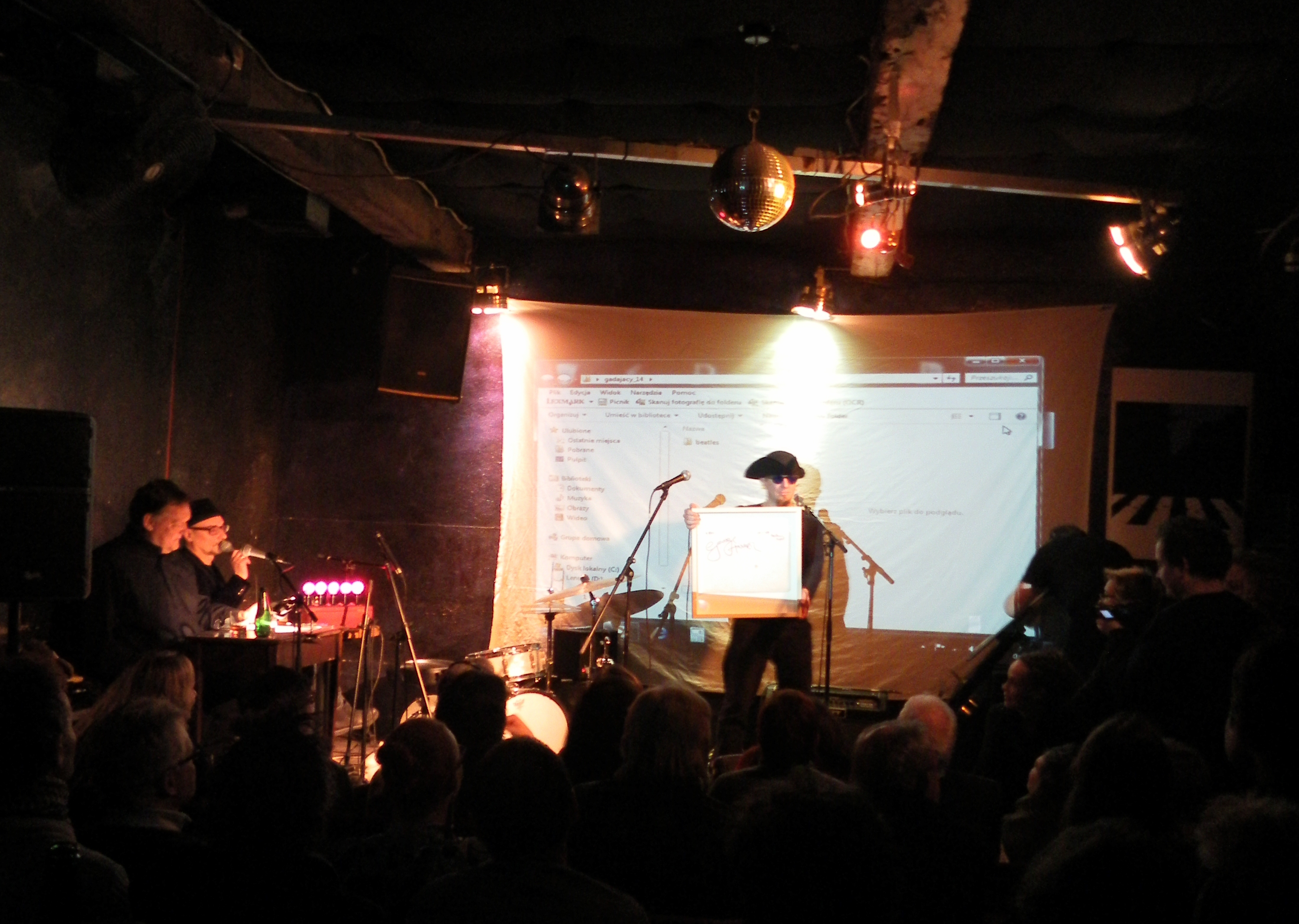 14 odcinek "Gadającego Psa", krakowskiego pisma mówionego. Przy stoliku siedzą od lewej: Piotr Bikont i Maciej Piotr Prus, prowadzący. Na scenie Aleksander Janicki.